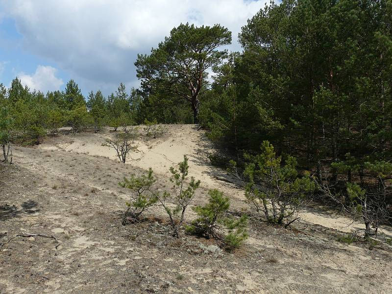 Rezerwat przyrody Mierkowskie Suche Bory - gmina Lubsko; woj. lubuskie